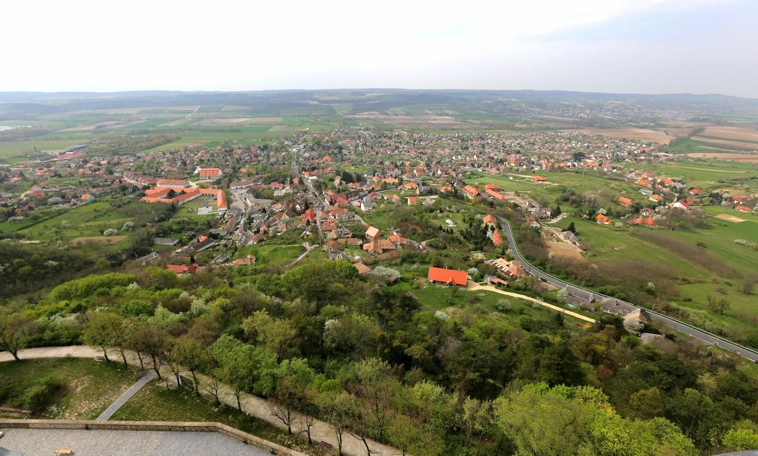 Pannonhalma telepölés az apátsági templom tornyából nézve